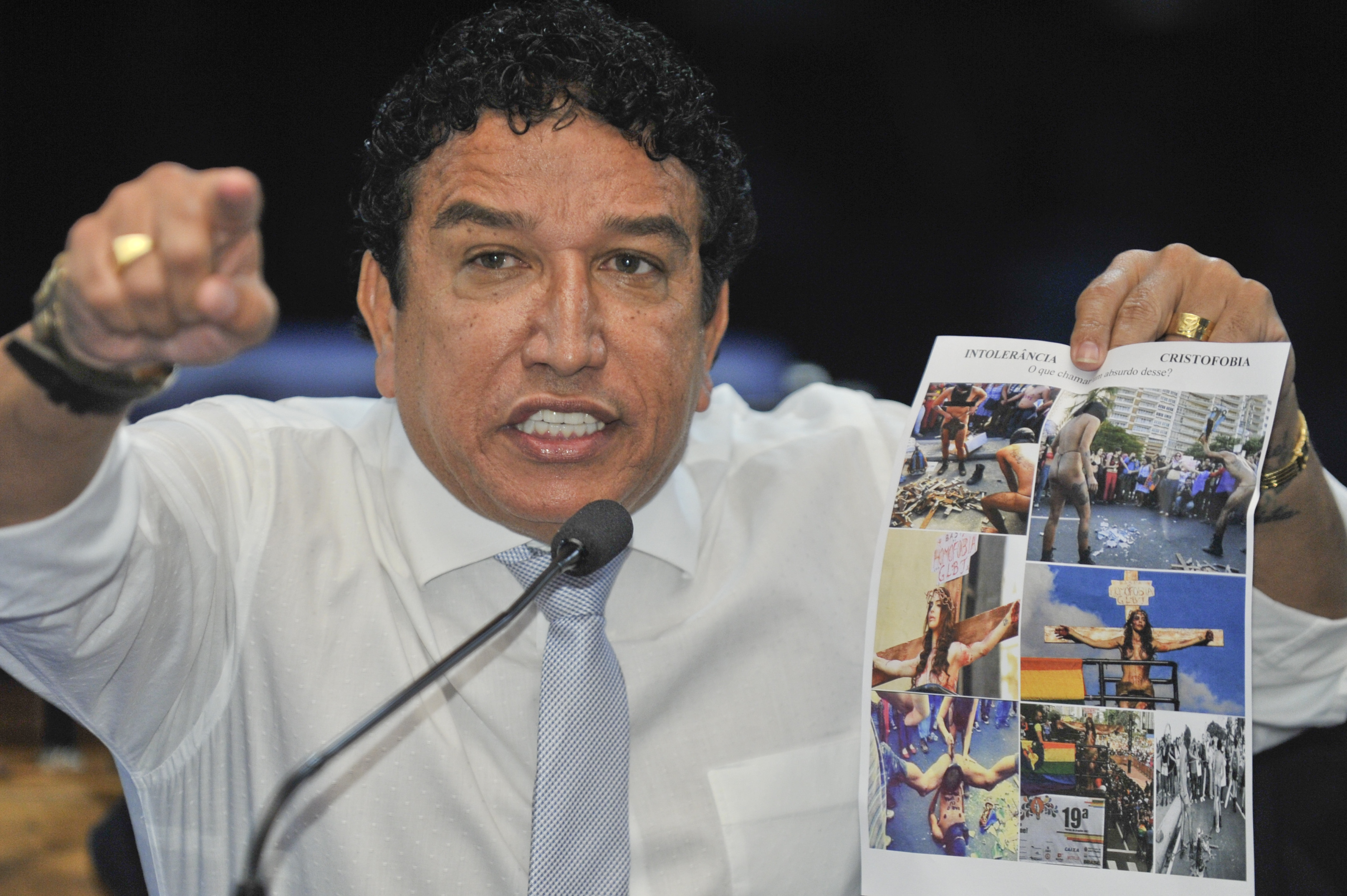 Plenário do Senado Federal durante sessão deliberativa ordinária. Em pronunciamento, senador Magno Malta (PR-ES). Foto: Waldemir Barreto/Agência Senado